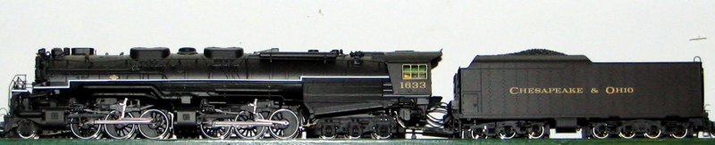 Giorgio Giuliani Fotografia mia Rivarossi - Locomotiva a Vapore americana 2-6-6-6 Allegheny